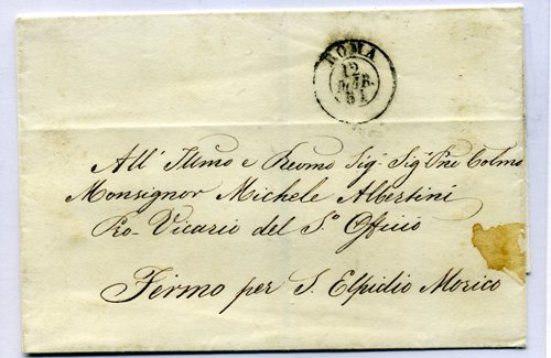 Lettera con timbro prefilatelico dello Stato Pontificio proveniente da collezione personale dell'autore